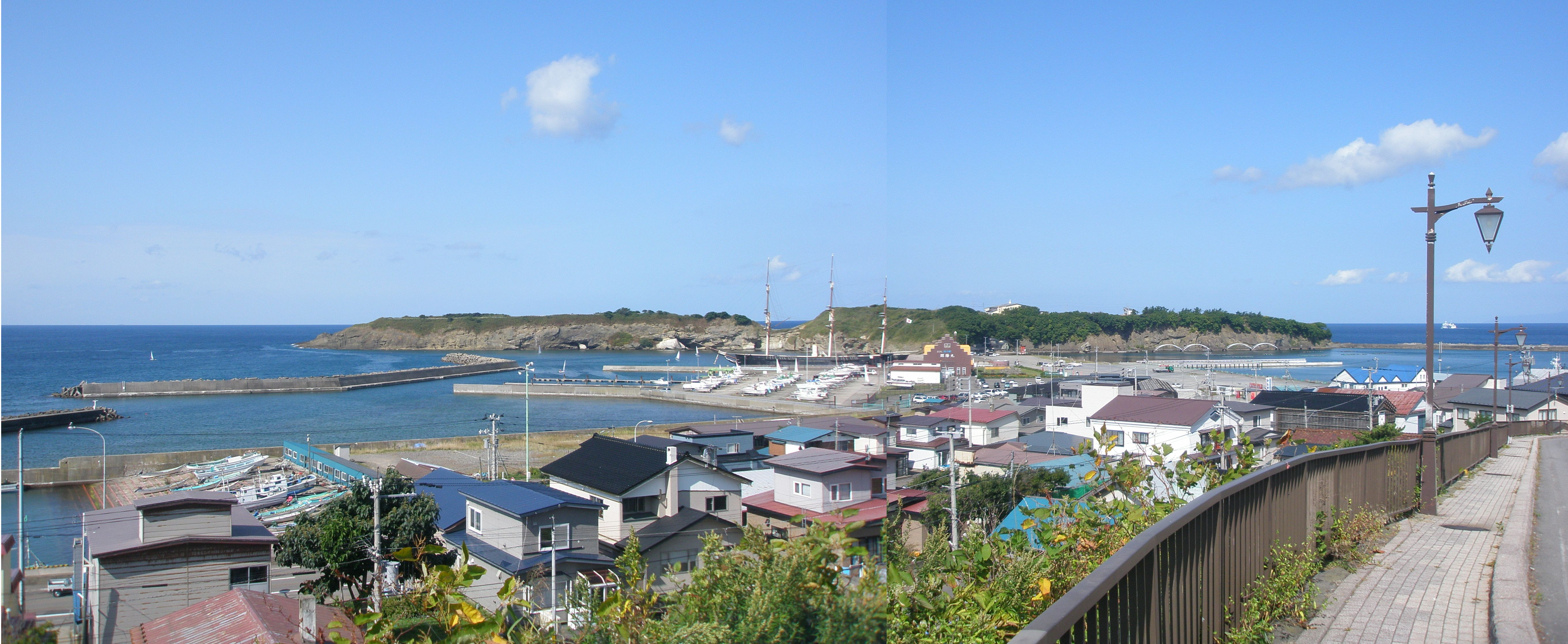 鴎島全景（2枚合成）